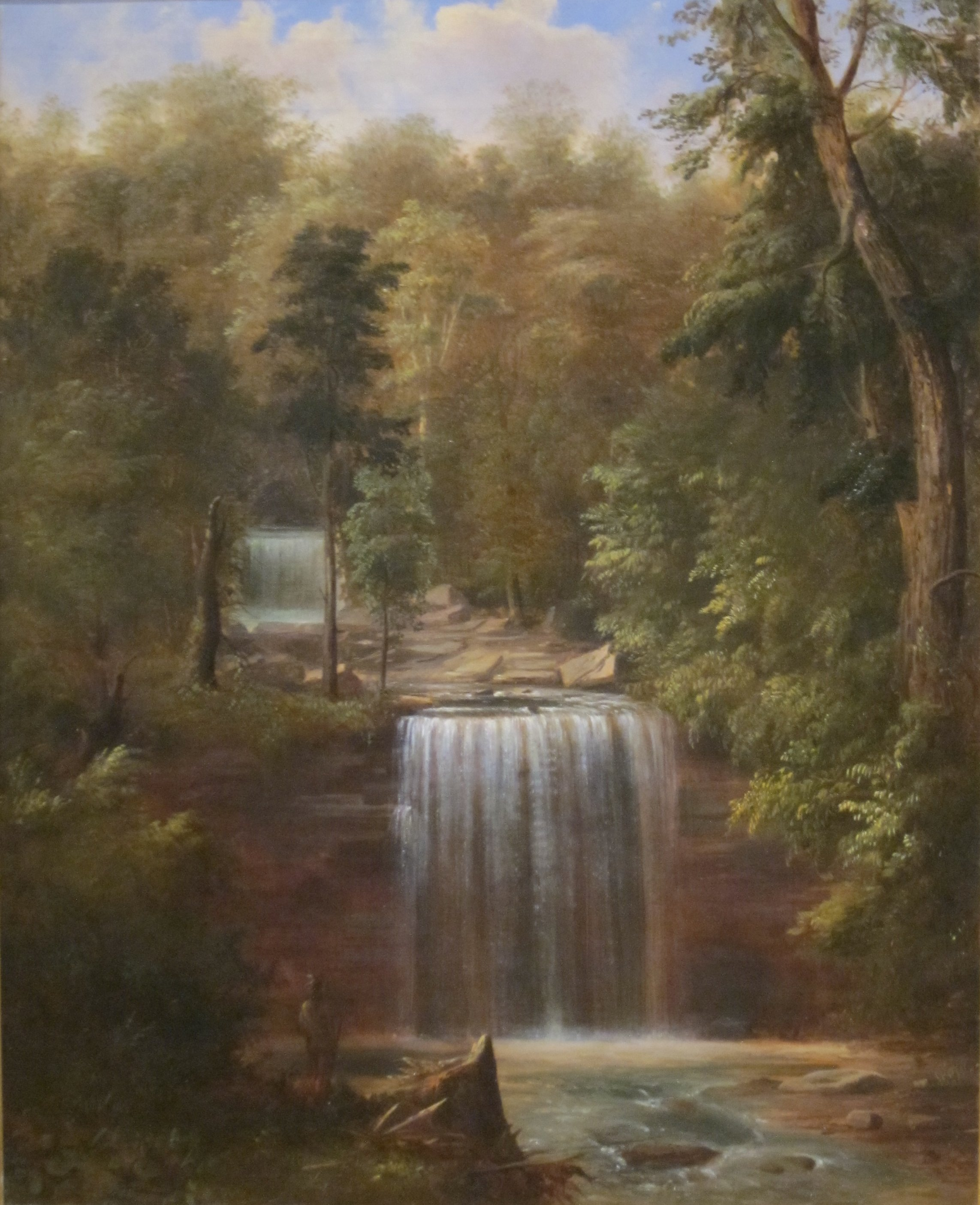 Minneopa Falls, Minnesota